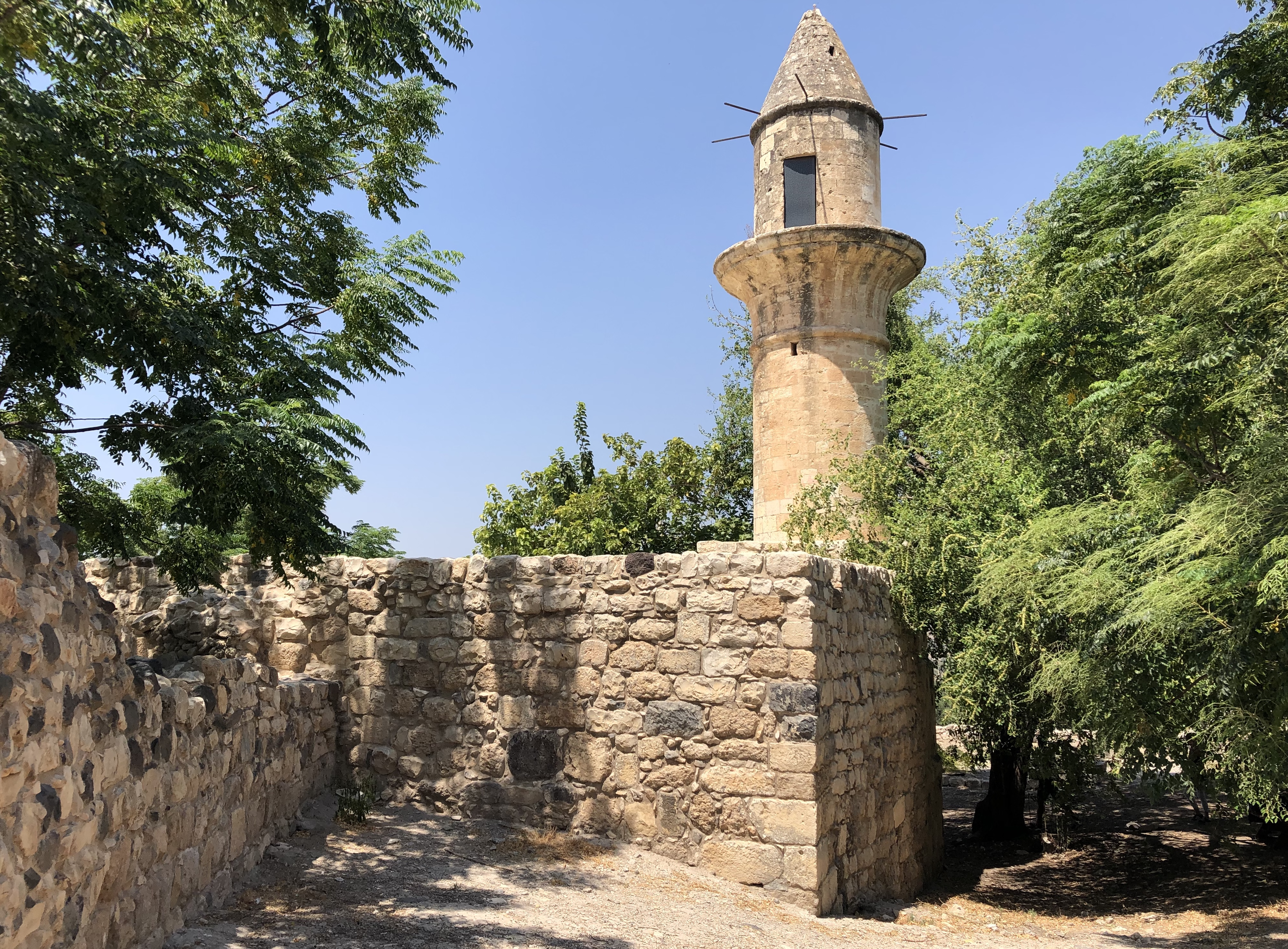 حطّين قرية فلسطينية